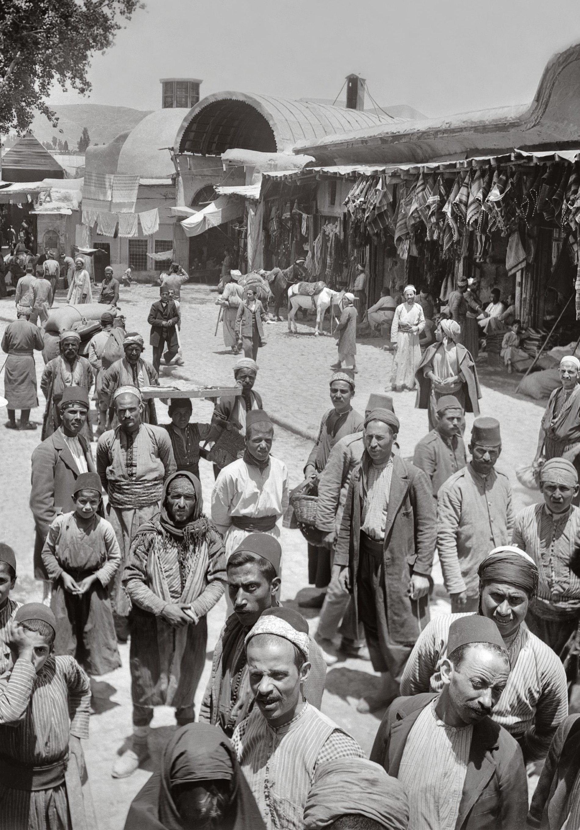 Suriye-1910